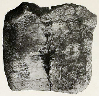 "Capitalsaurus potens" vertebra.